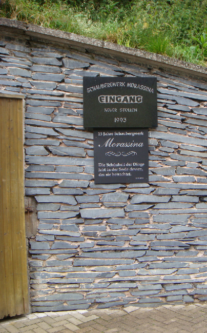 Morassina-Höhle, Eingangsschild